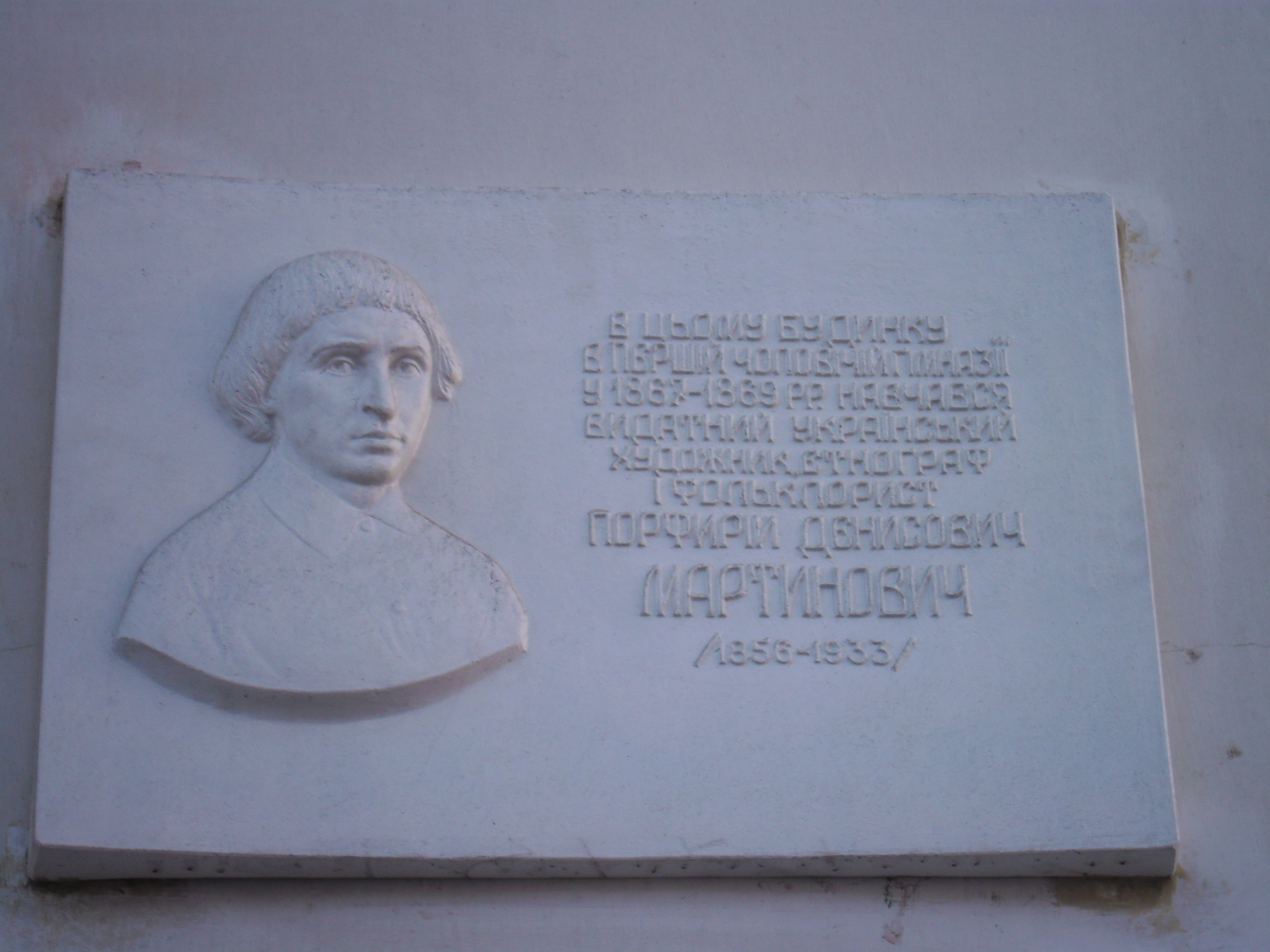 Мемориальна дошка П.Д. Мартиновичу у Харкові (Перша гімназія)